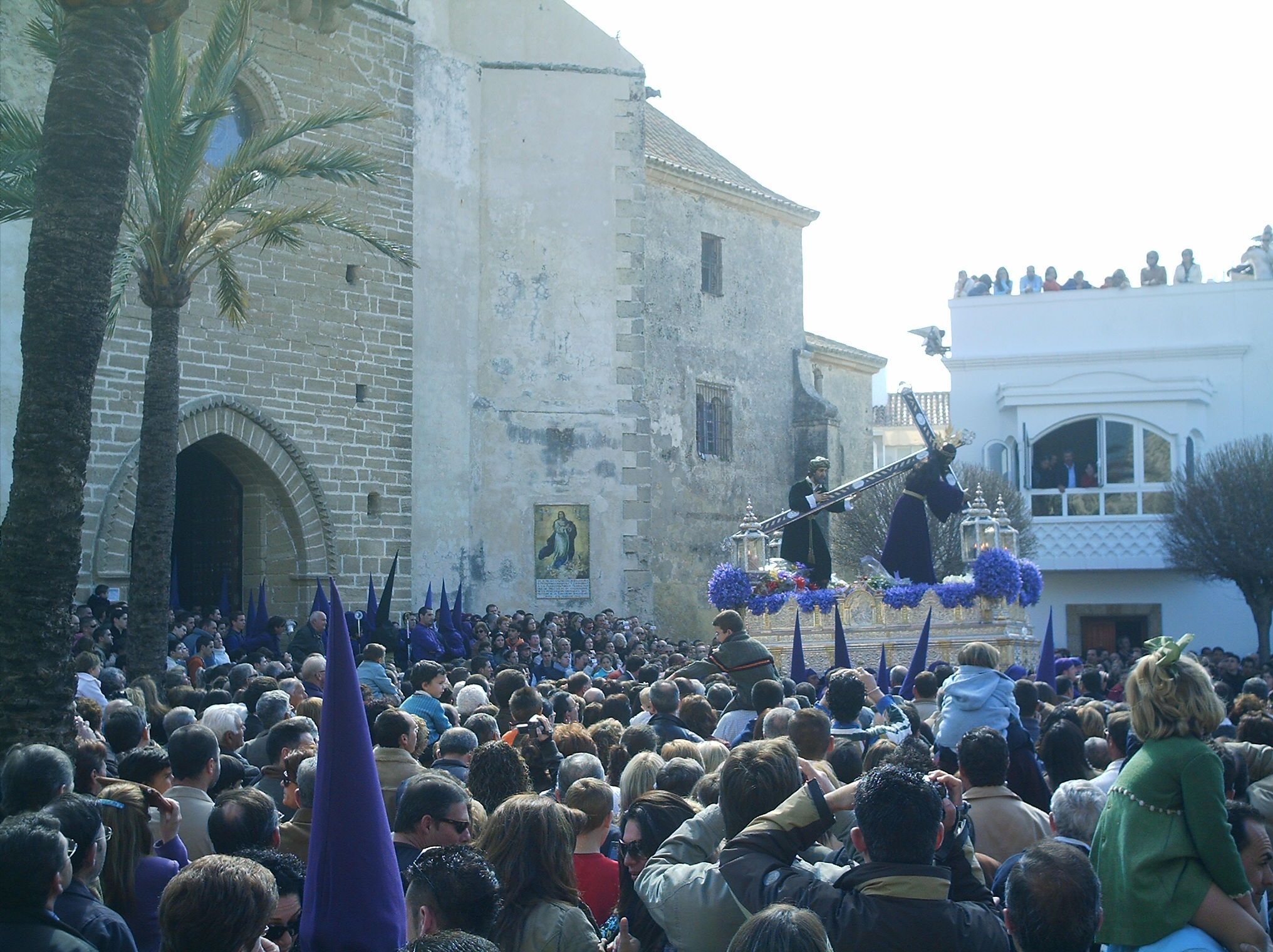 El Nazareno de Rota (Cádiz) a punto de recogerse en la Iglesia de la O